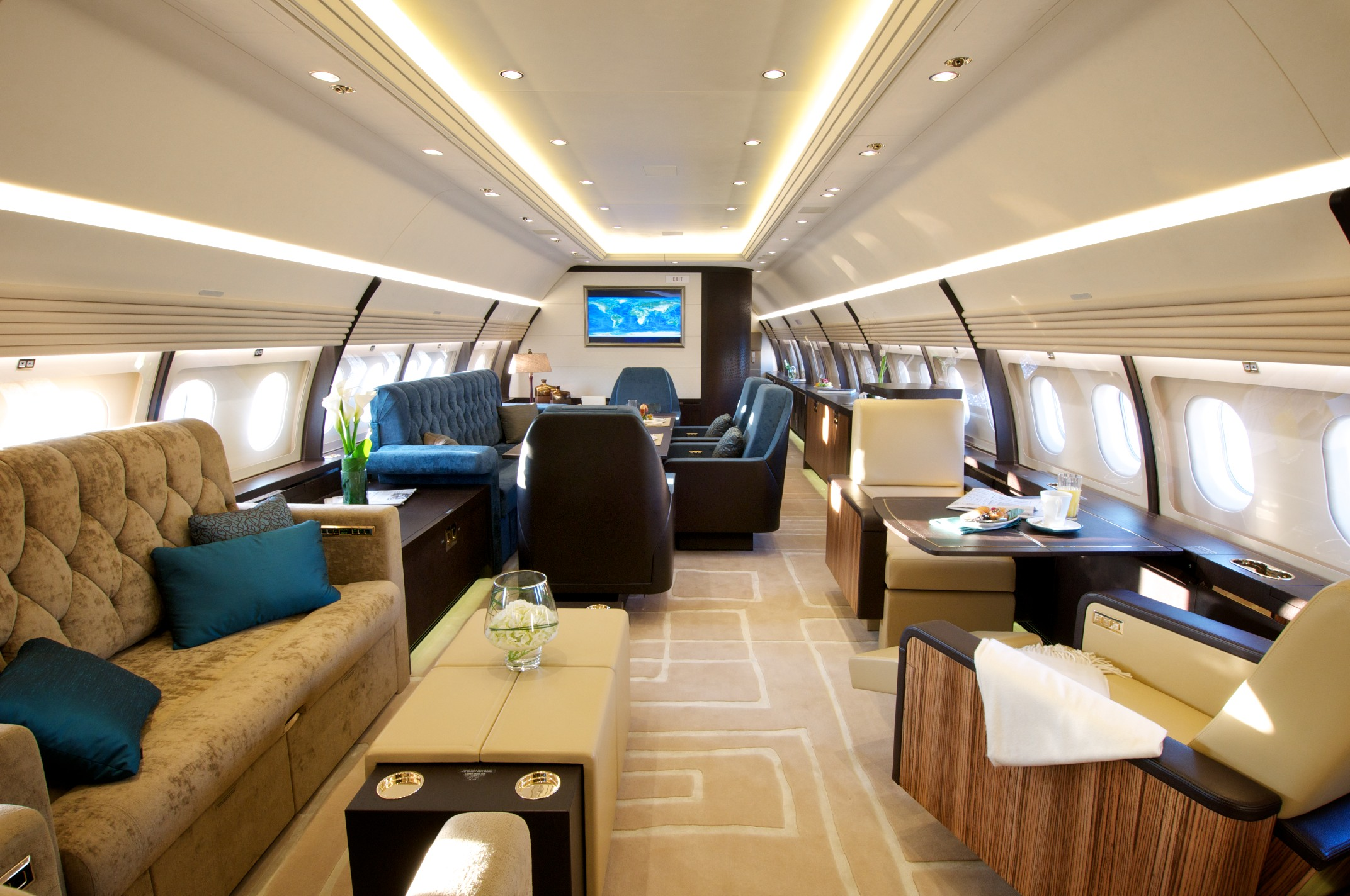 Comlux Airbus ACJ320 VVIP interior